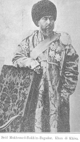 Хан Хивинского ханства Мухаммад Рахим-хан II